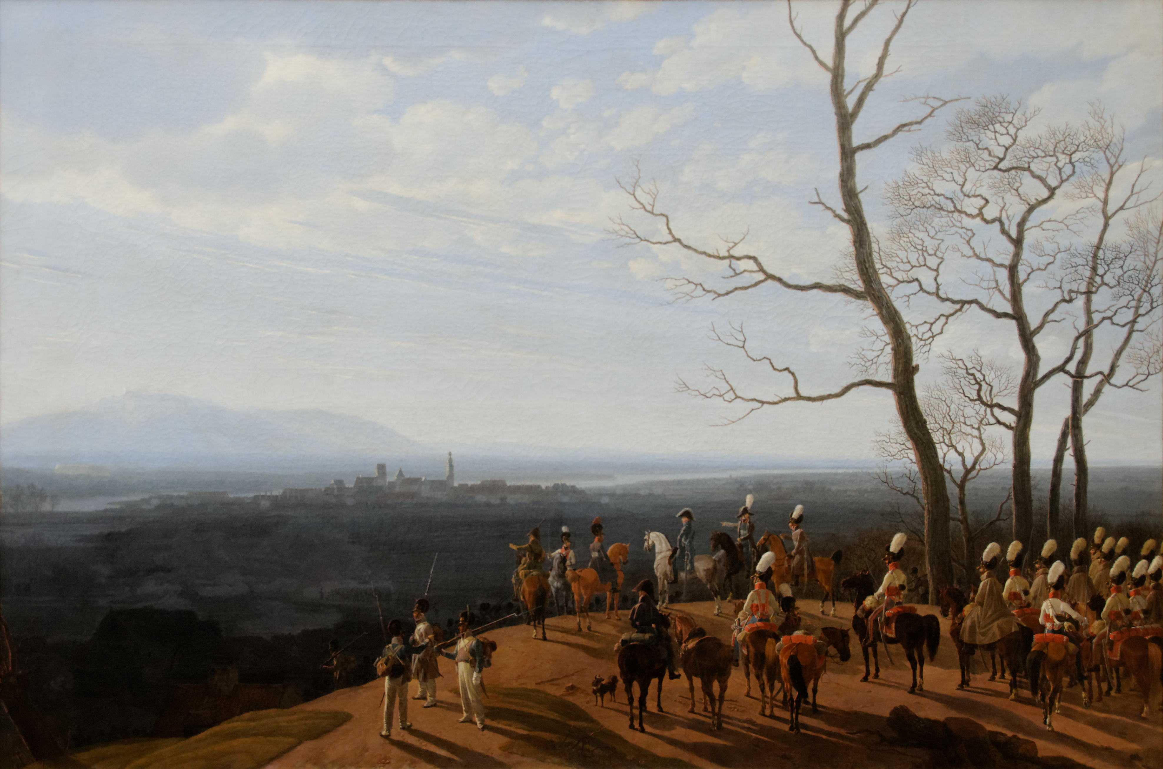 Die Belagerung von Koźle (Cosel) im Dritten Koalitionskrieg (Abwehr eines Ausfalls der preußischen Besatzung durch die Bayern am 15. März 1807)